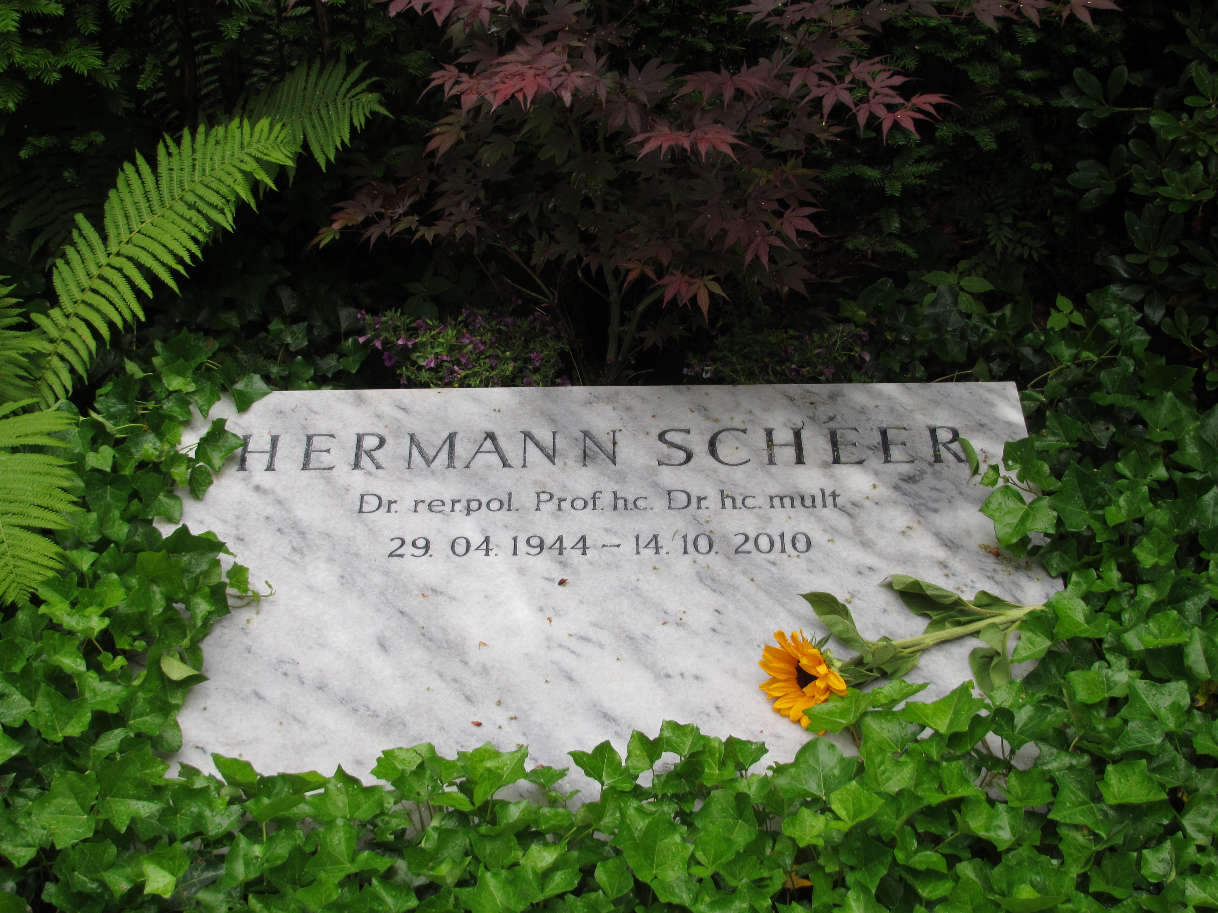 Hermann Scheer, 29. April 1944 in Wehrheim - 14. Oktober 2010 in Berlin, Grabstätte: Feld 16-A-20/21, Trakehner Allee 1, Berlin-Westend Friedhof Heerstraße (Waldfriedhof Heerstraße)